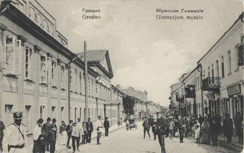 Вуліца Савецкая